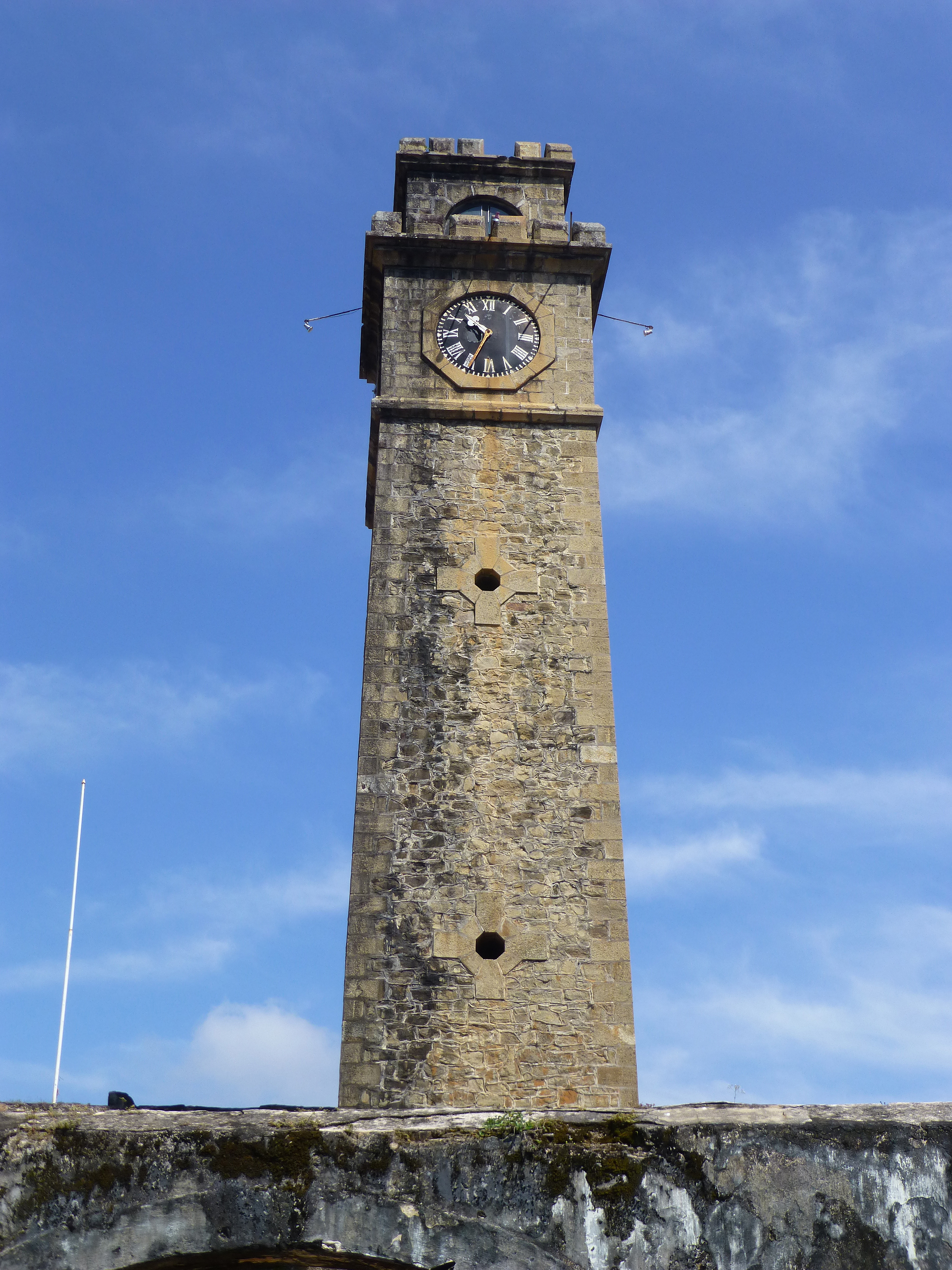 Tour de l'horloge dans le fort de Galle (Sri Lanka)